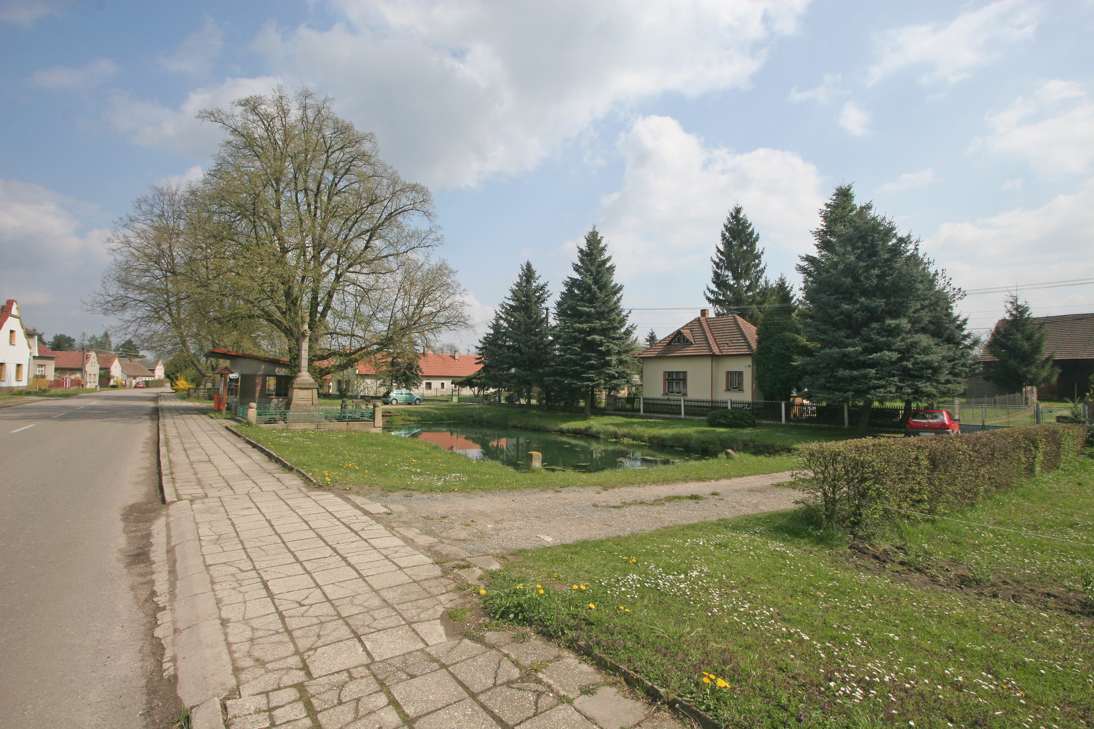 Smidarská Lhota náves